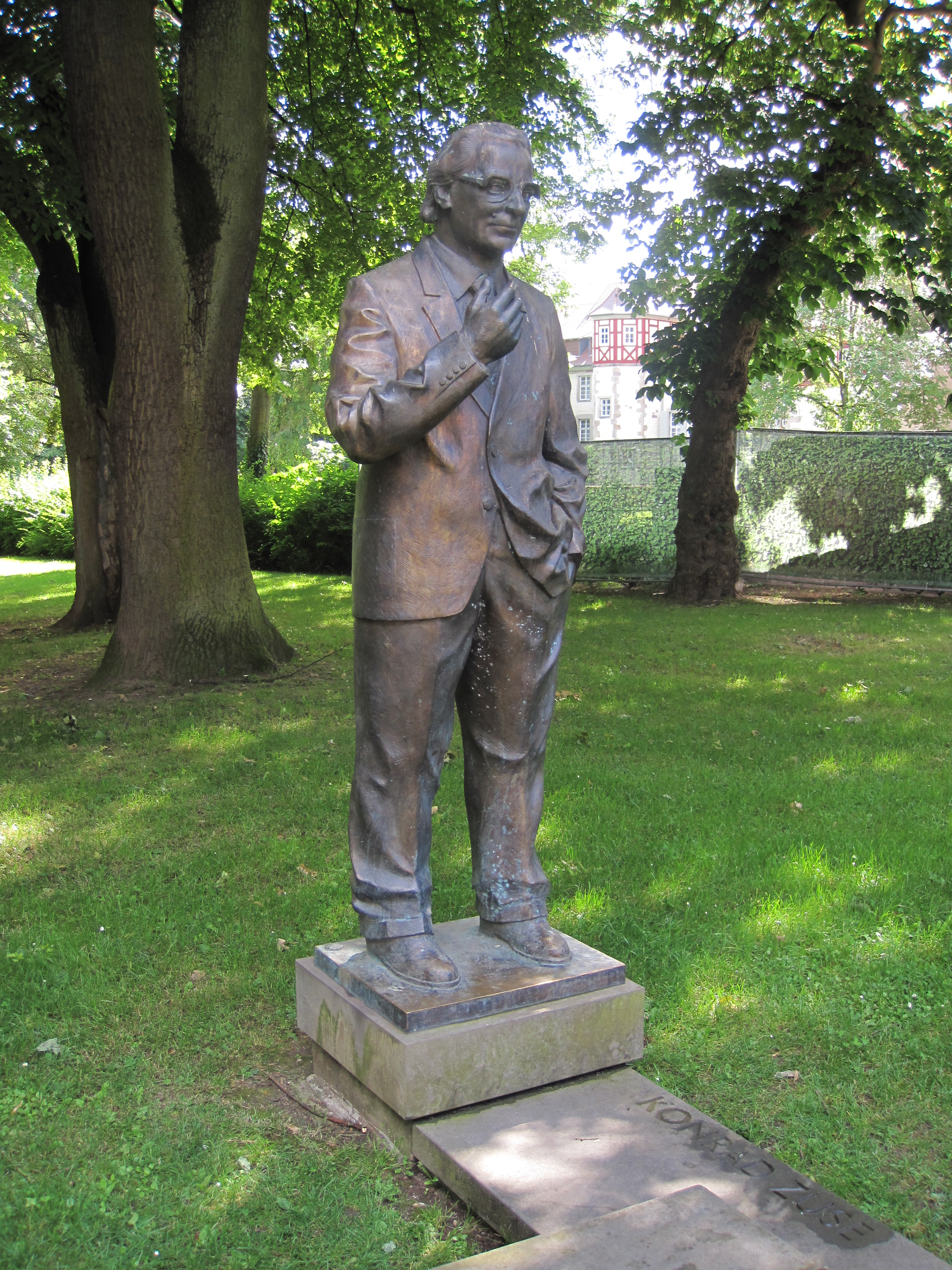 Konrad-Zuse-Denkmal in Bad Hersfeld (2016)